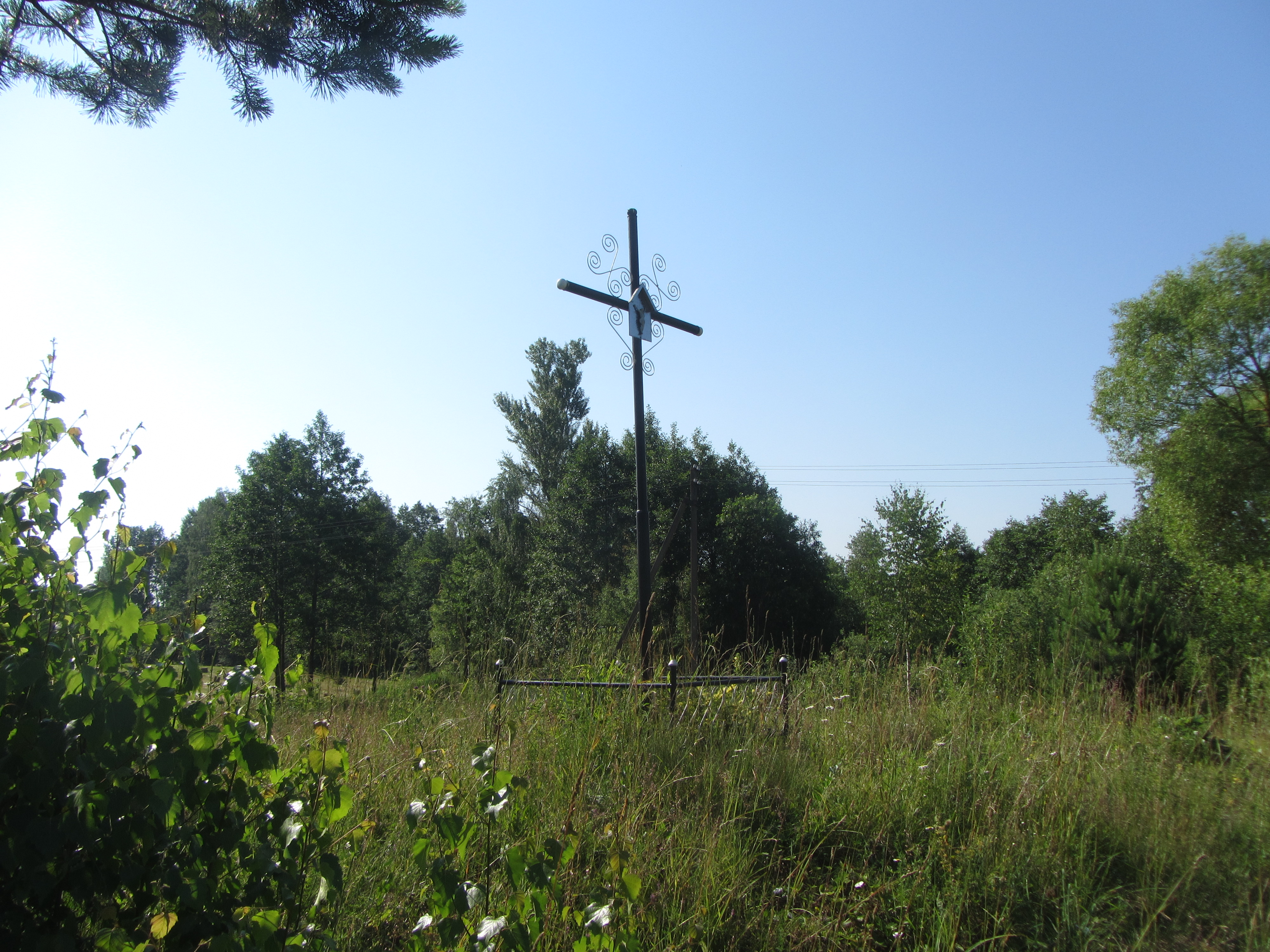 Buteliūnai, Lithuania